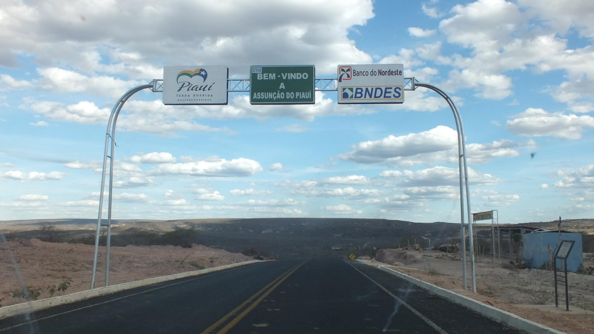 Entrada da cidade de Assunção do Piauí.